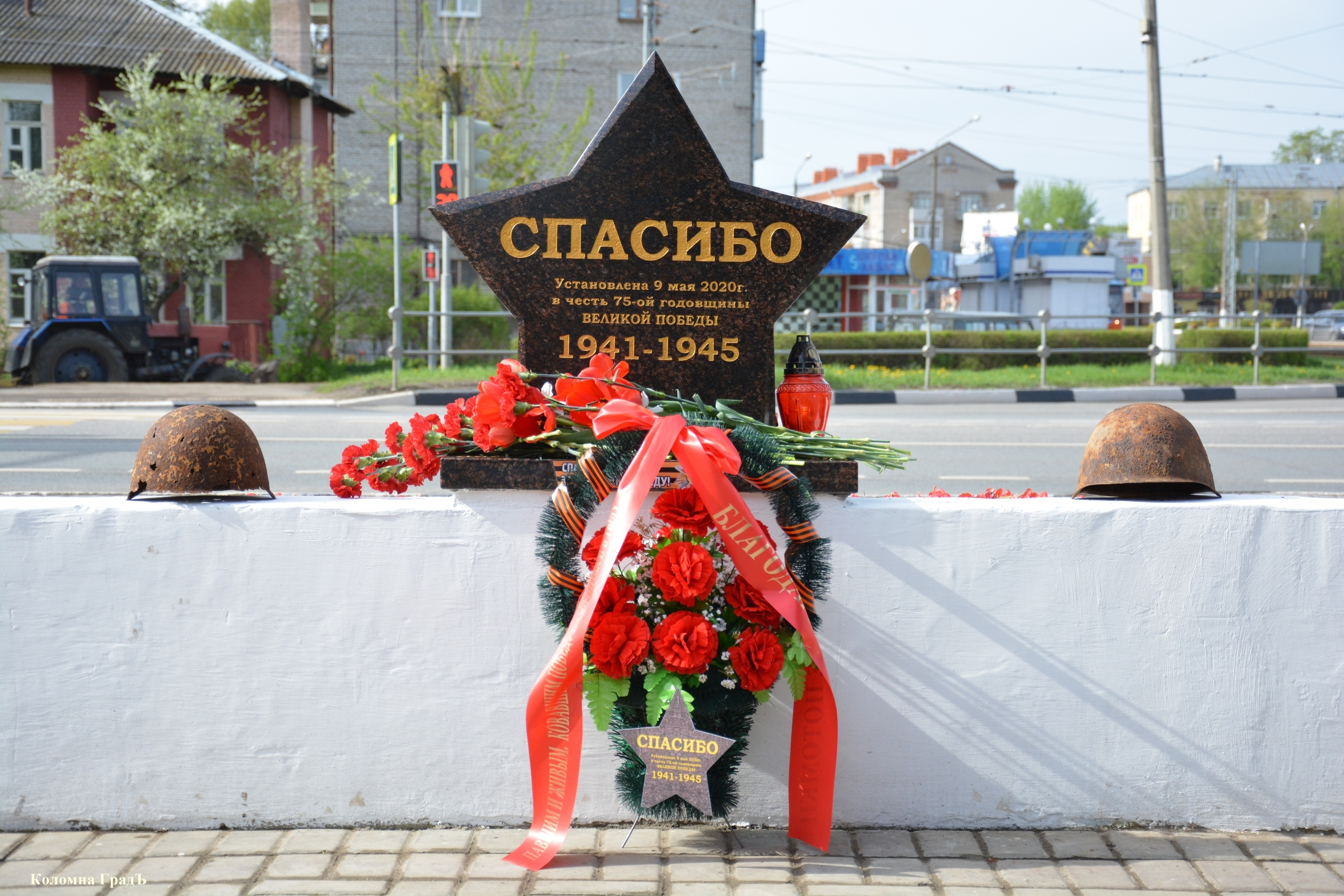 Звезда Бессмертного полка тыльная (сторона)